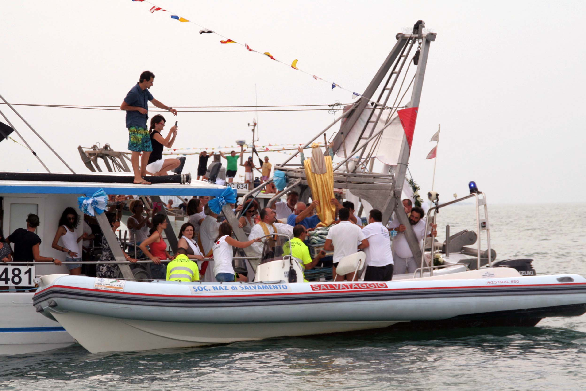 Festa della Madonna del Mare Assunta in Cielo: riconsegna della statua della Madonna